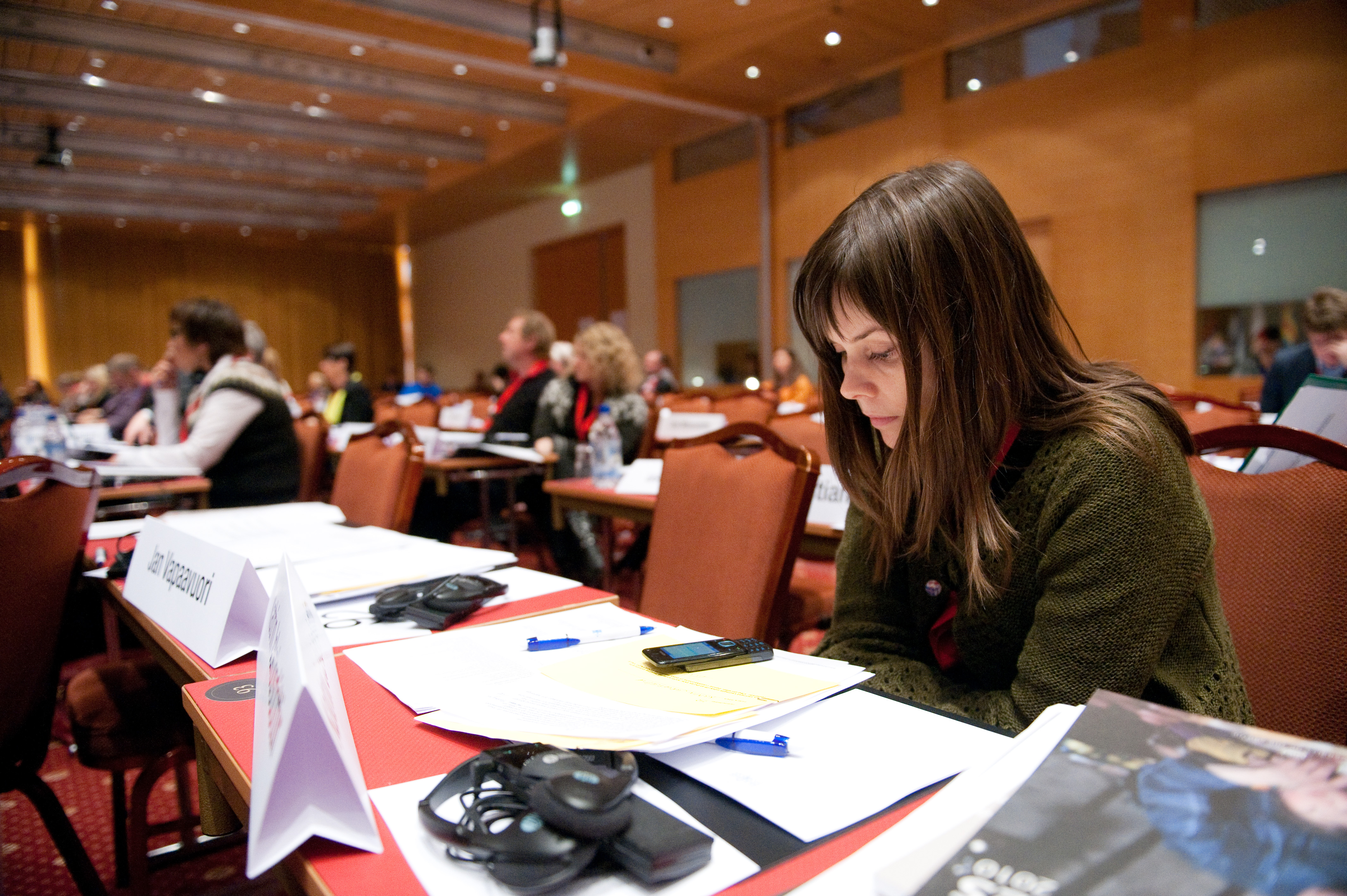 Katrín Jakobsdóttir vid Nordiska Rådets session i Reykjavik